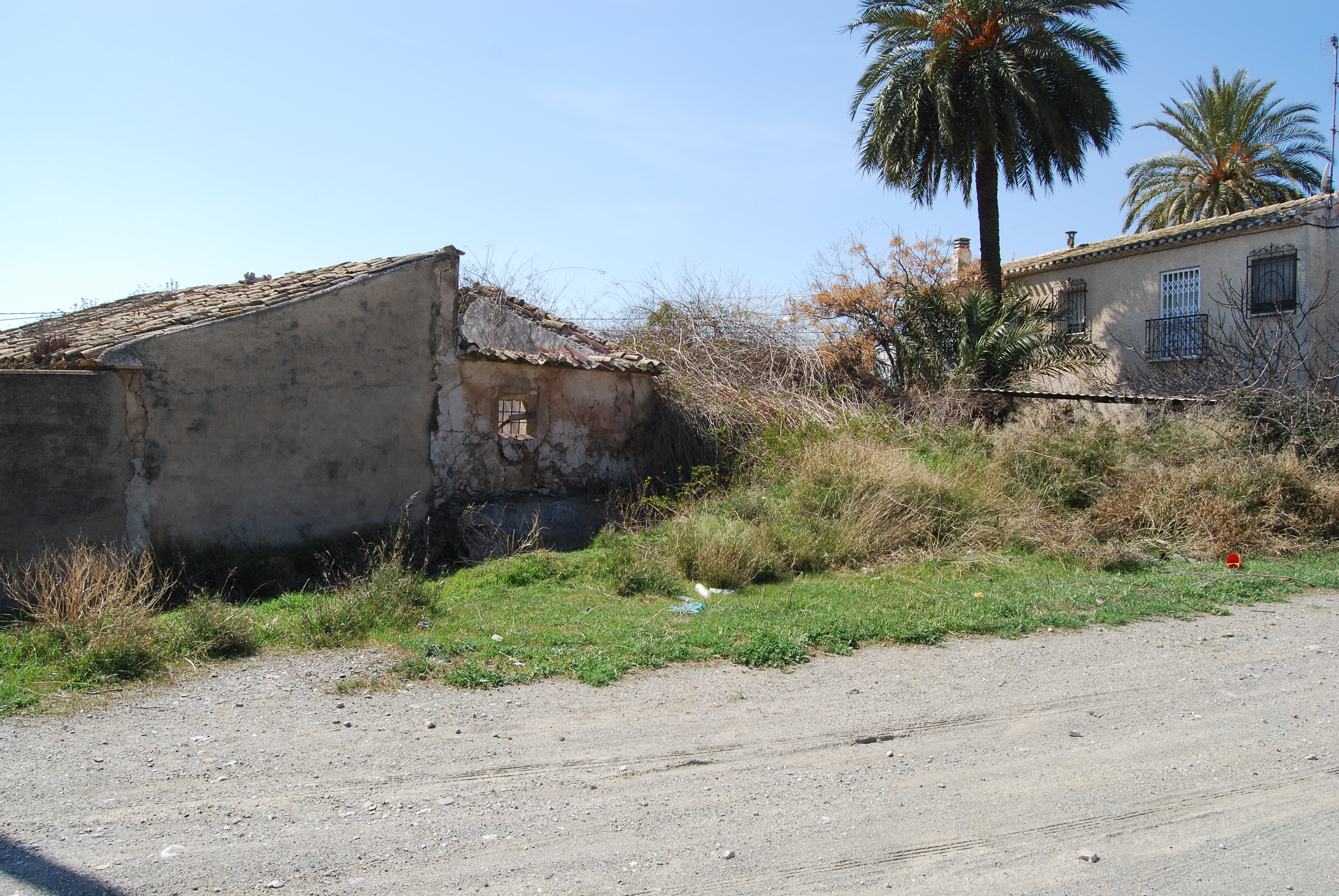 Vista general de la parte trasera del Molino de Jérez